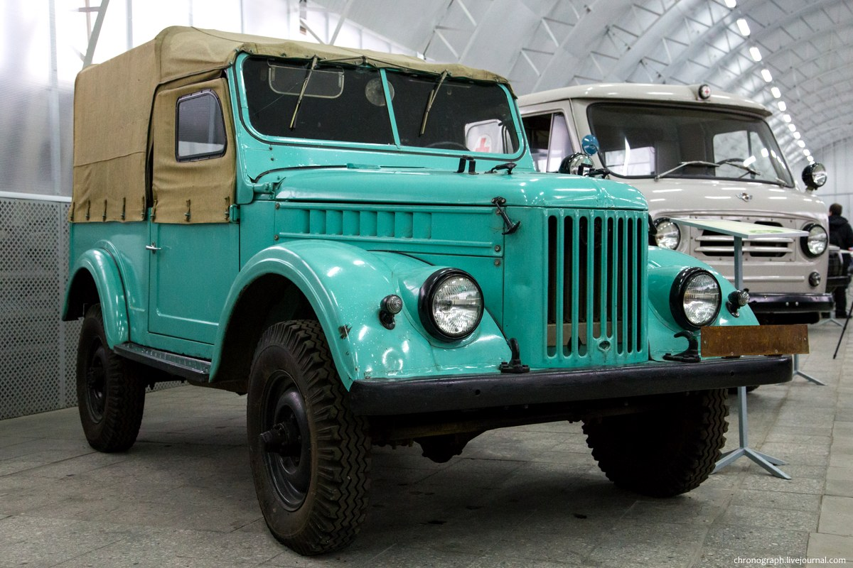 ГАЗ-69 выпуска Ульяновского автомобильного завода. Выставочный павильон-музей УАЗа.